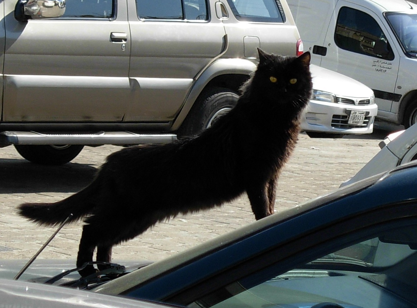 കുവൈറ്റിലെ ഒരു തെരുവ് പൂച്ച.